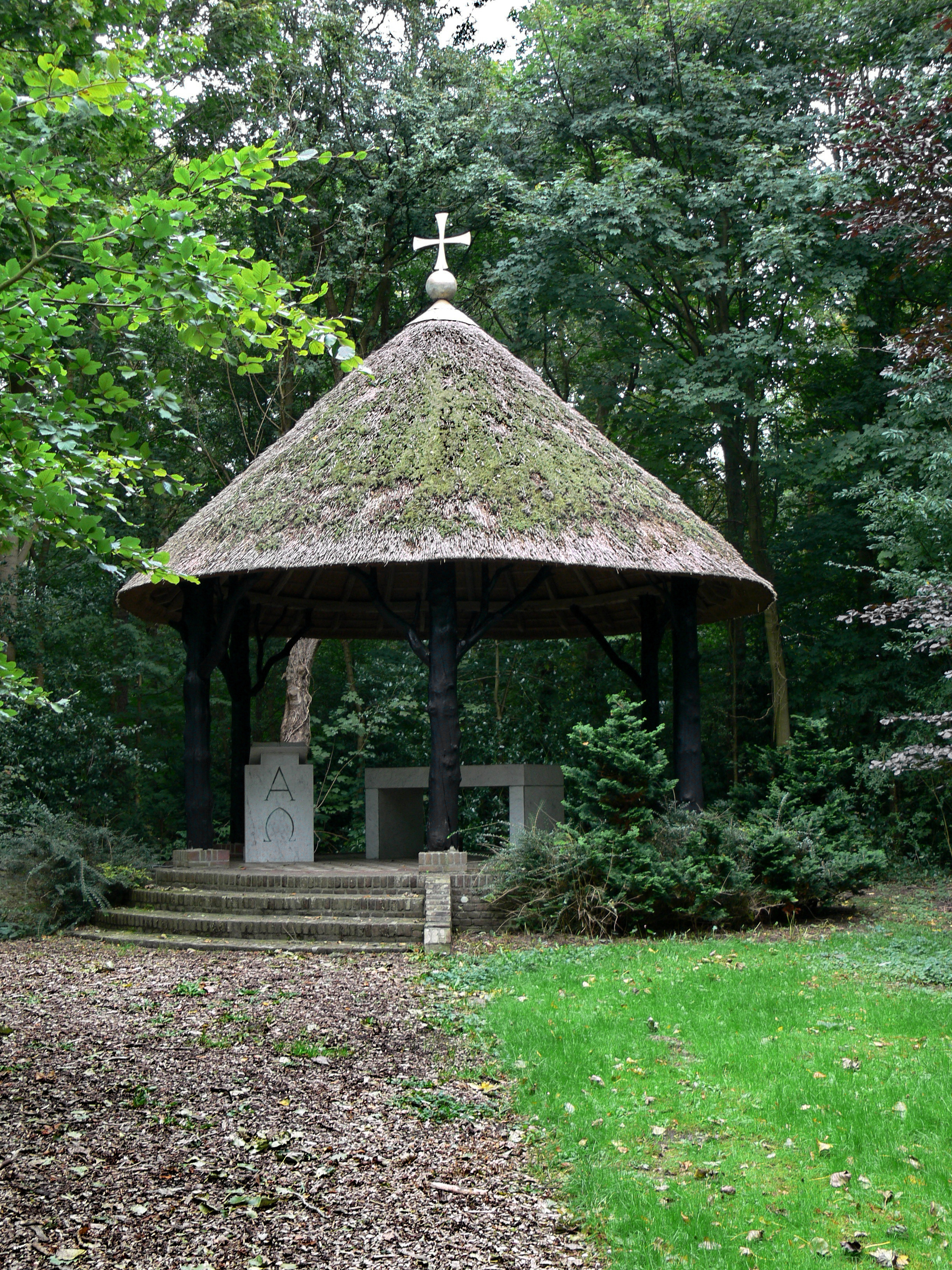 Vrijstaand RUSTALTAAR met centrale plattegrond vermoedelijk gerealiseerd ten tijde van de aanleg in het tweede decennium van de twintigste eeuw als onderdeel van het bedevaartscomplex 'Onze Lieve Vrouwe ter Nood'. In het materiaalgebruik met onder meer boomstammen en riet, is aansluiting gezocht bij de natuurlijke omgeving. Het rustaltaar is opvallend gesitueerd naast de vijver en in de zicht-as vanaf de noodkerk. De witmarmeren altaartafel is van recente datum (XXd). Het rustaltaar bestaat uit een rond podium waarop in een ruime cirkel zes boomstammen staan die een rietgedekt kegeldak dragen dat bekroond wordt door een vergulde wereldbol met kruis. De geteerde boomstammen zijn bovenaan ter weerszijden voorzien van (deels verdwenen) zijtakken. Het podium is gemetseld van rode machinale baksteen waalformaat in koppenverband met platvolle voeg. Tegen de westzijde ervan is in dezelfde baksteen een brede trap gemetseld waarvan de drie treden de ronde vorm van het podium volgen. Het podium heeft een vloer van witte en lichtgele tegels in schaakbordpatroon omgeven door twee randen rode tegels en een dubbele rollaag van rode waalsteen waartussen een gleuf gevuld met grond bestemd voor bloemen of planten. Op de binnenste rollaag staan zes gemetselde poeren van rode waalsteen waaraan de zes boomstammen met twee ijzeren banden bevestigd zijn. De sporen onder het dak rusten op een door de boomstammen gedragen houten ring.